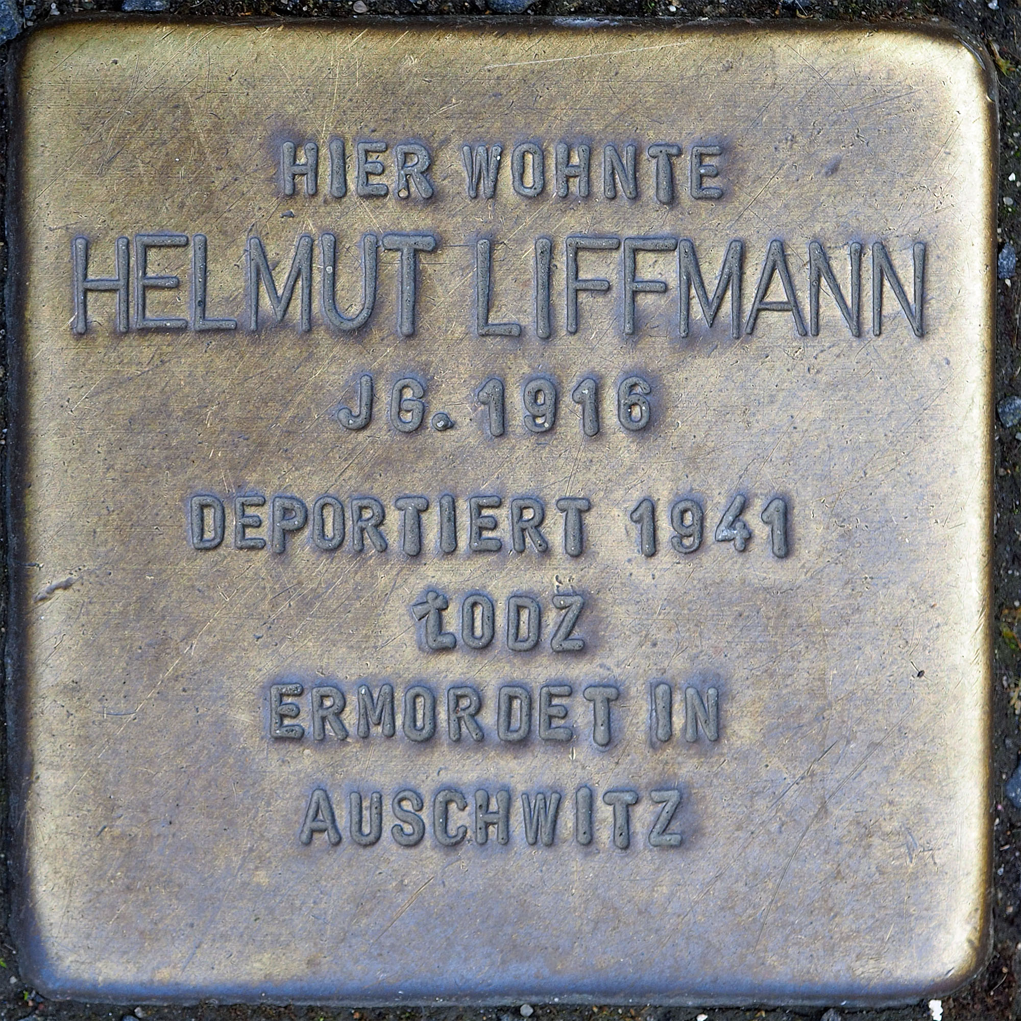 Stolpersteine MG: Liffmann, Helmut